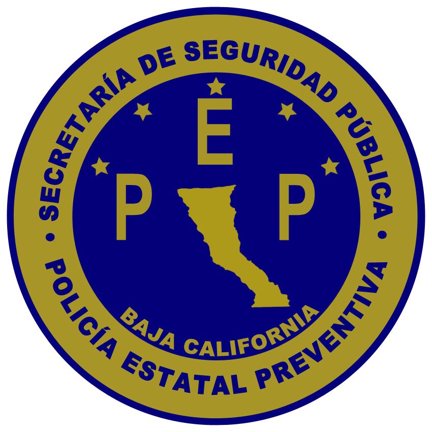 Logo de la Policía Estatal Preventida de Baja California